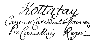 Hugo Kołłątaj autograph 19 May 1791